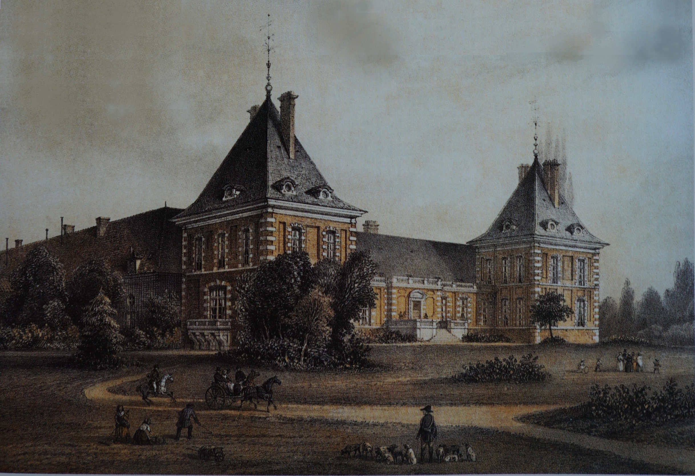 vue ancienne du chateau.